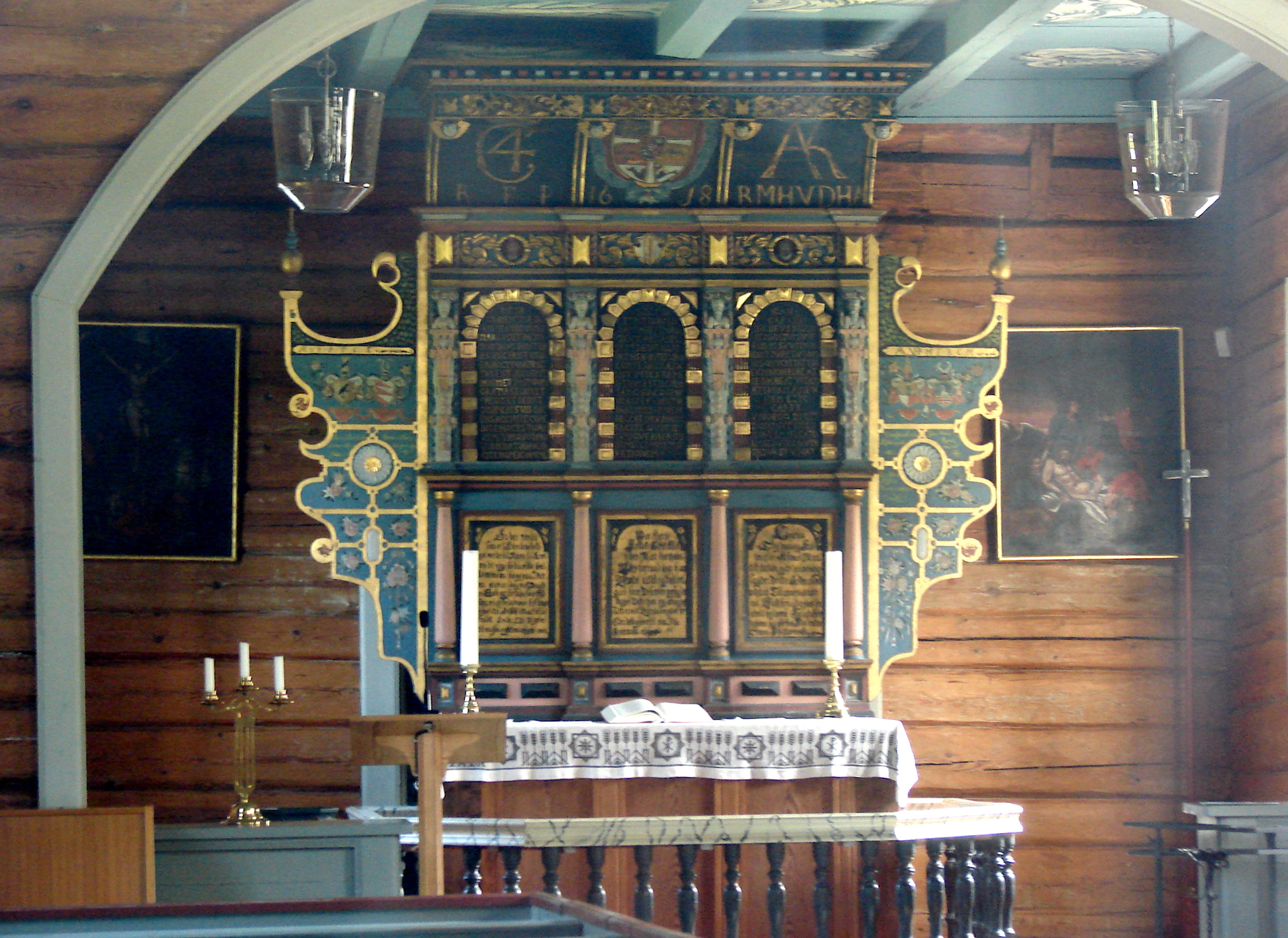 Altertavle i Mælum Kirke med Christian IV af Danmark og Norges monogram øverst til venstre (og formentlig hans kone dronning Anne Kathrine til højre), Telemark